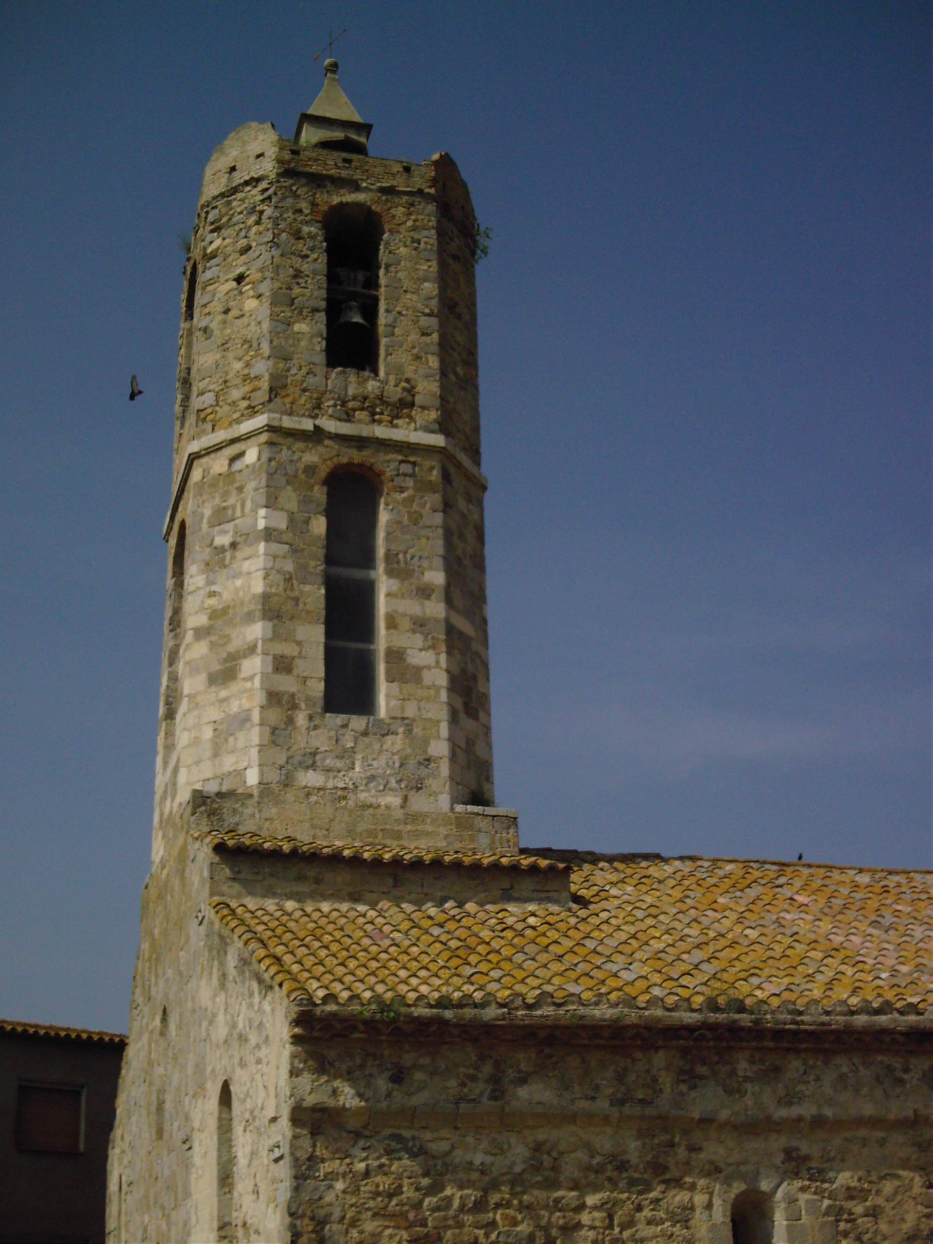 campanar